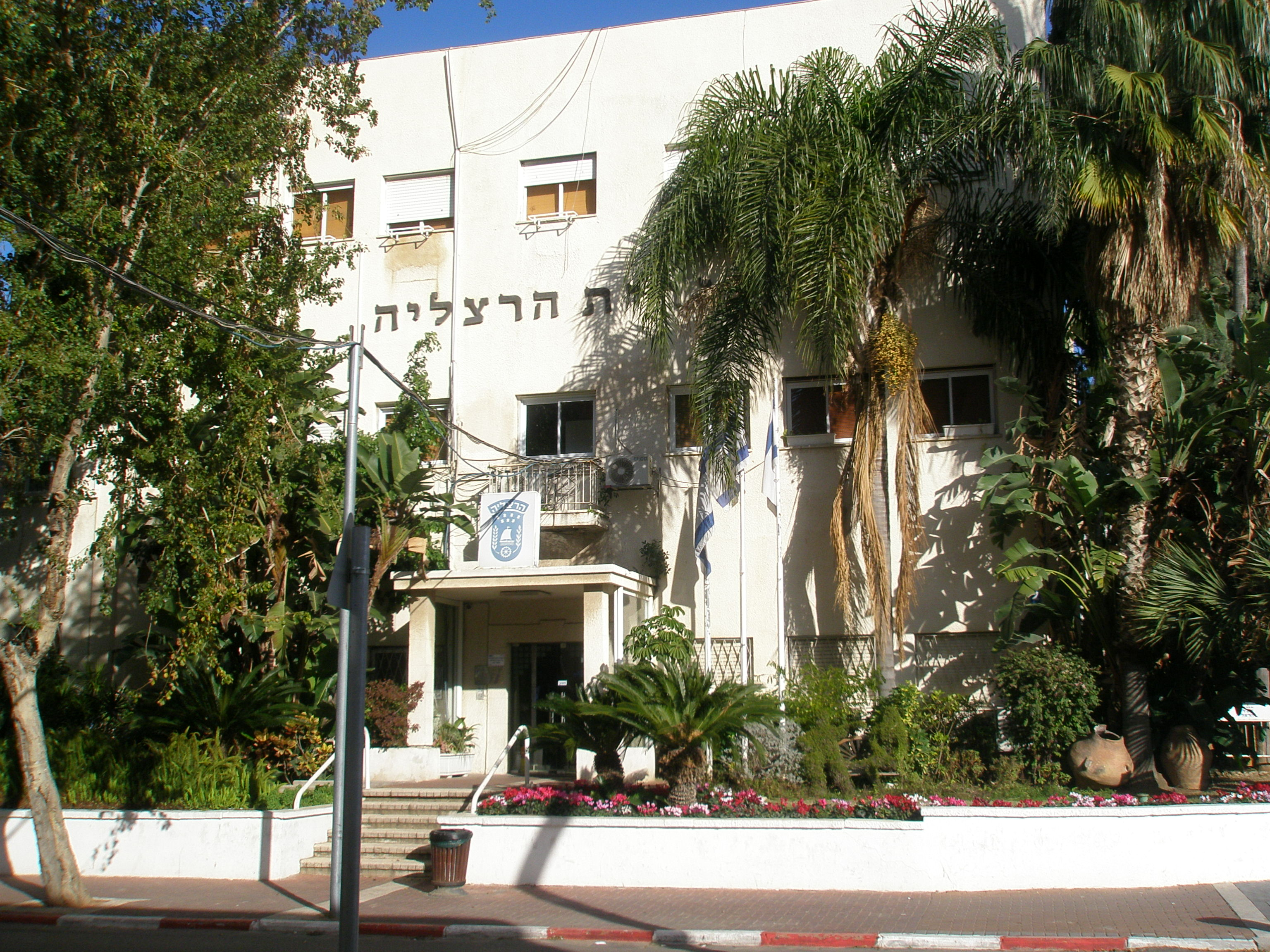 Herzliya City Hall